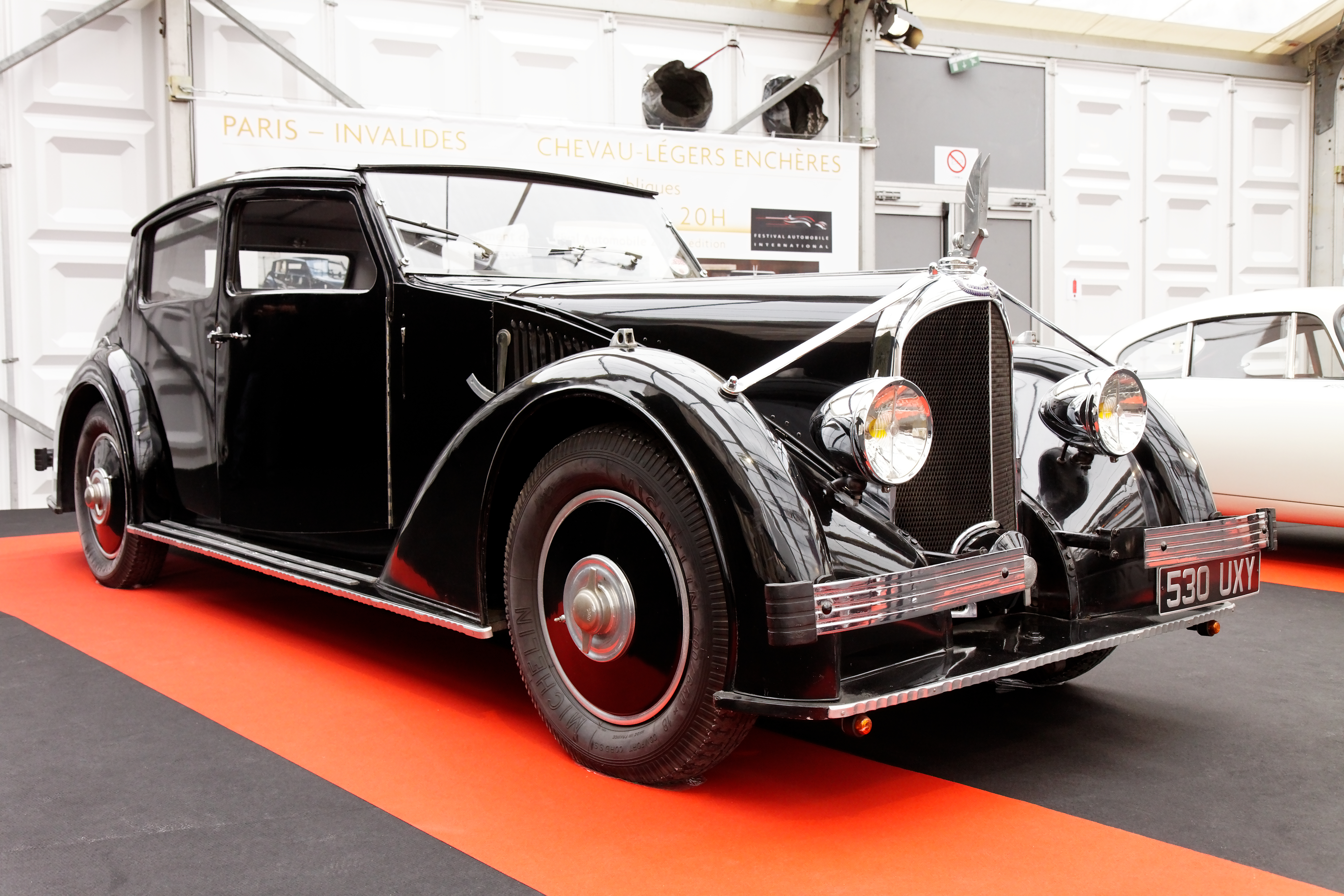 L'Avions Voisin C25 Cimier exposée devant le dôme des Invalides lors du festival automobile international 2011.